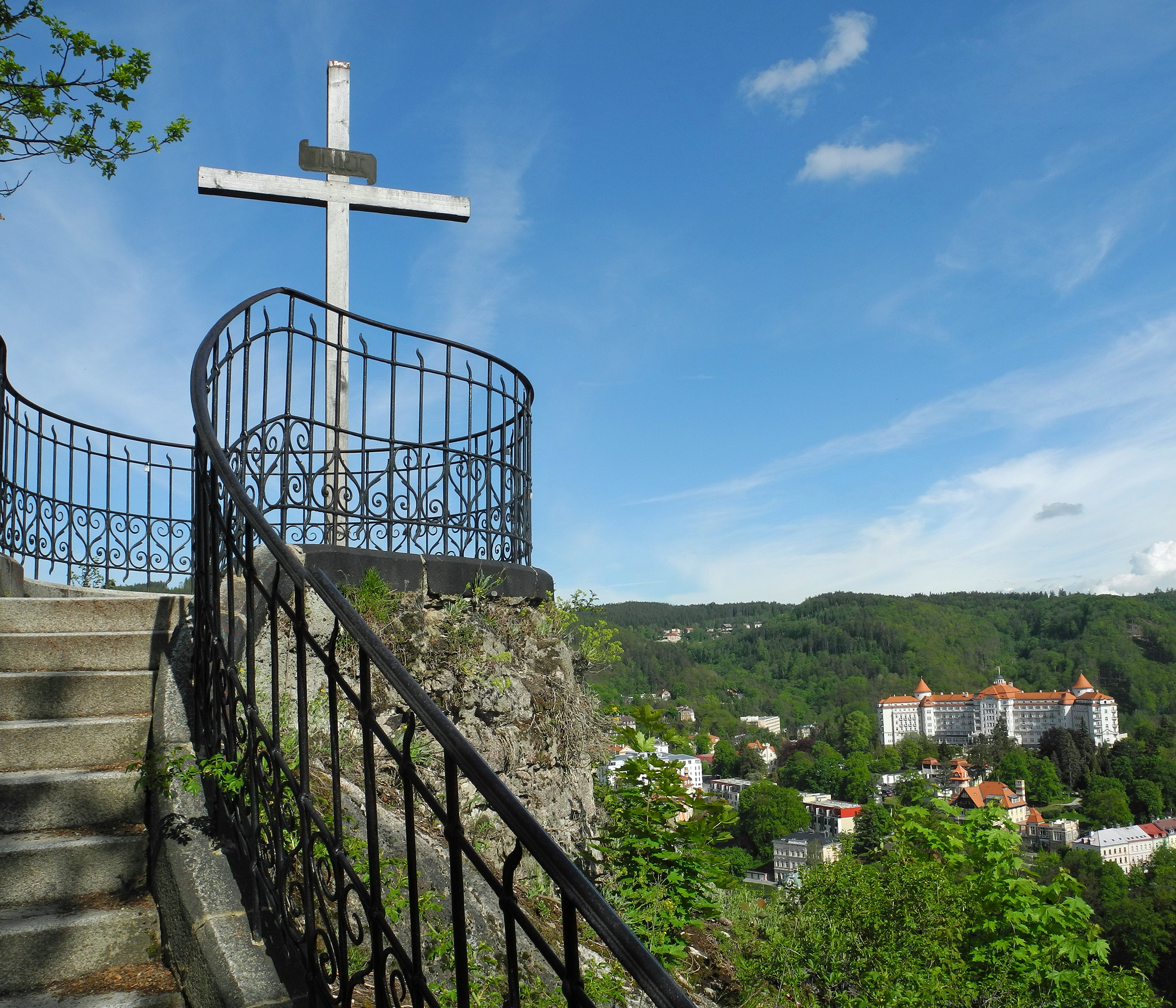 Aussichtspunkt Petershöhe oberhalb von Karlsbad (Karlovy Vary), benannt nach Zar Peter den Großen, der Karlsbad 1711 und 1712 besucht hat, mit Blick auf das Hotel Imperial